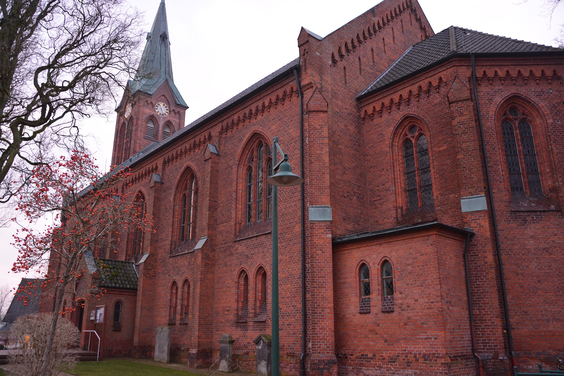 Die St.-Bartholomäus-Kirche zu Neuenkirchen von Südosten aus gesehen.